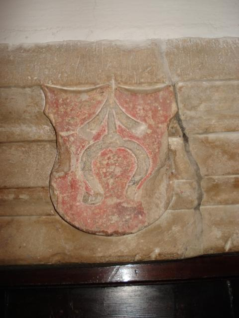 Herb Odrowąż w portalu dzrzwi na zamku w Szydłowcu